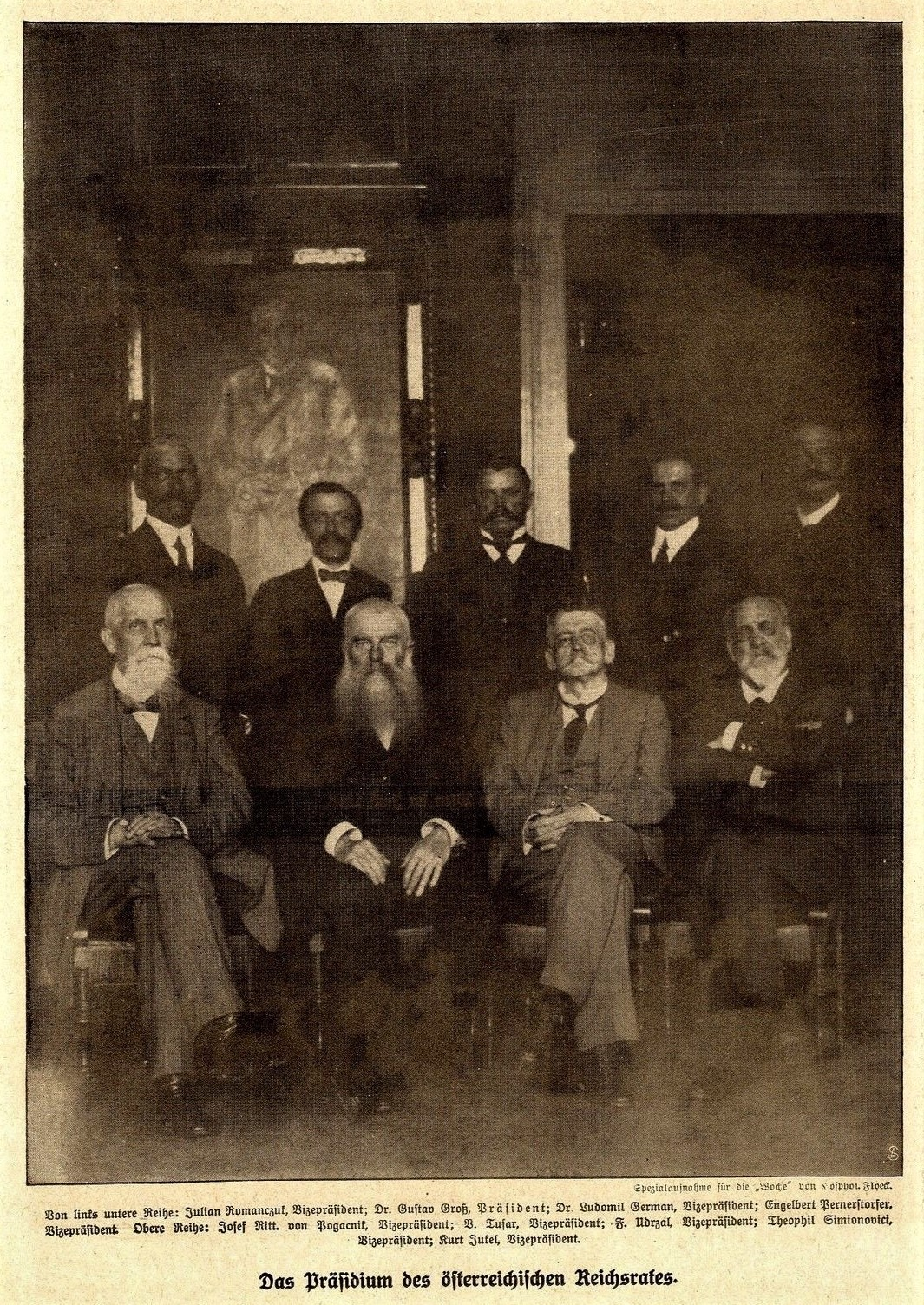 Das Präsidium des österreichischen Reichsrates, 1917. Spezialaufnahme für 'Die Woche'